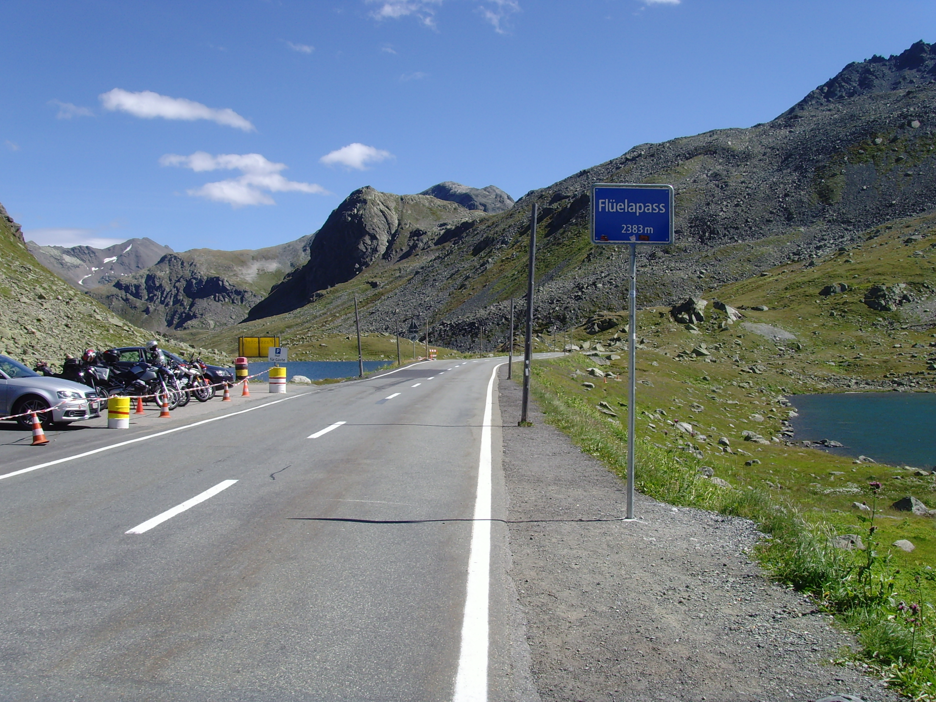 239 MV-Alpentour 2010 - Flüelapass. Taken in Flüelapass, Canton of Graubunden